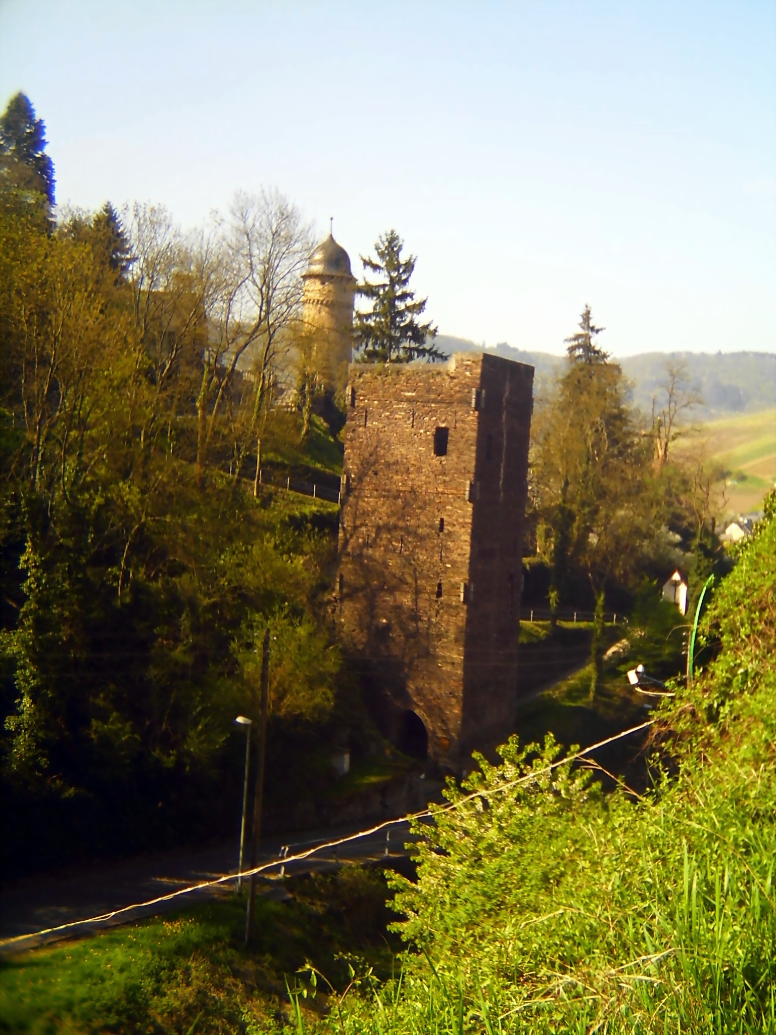 Türme der Stadtbefestigung Zell (Mosel)